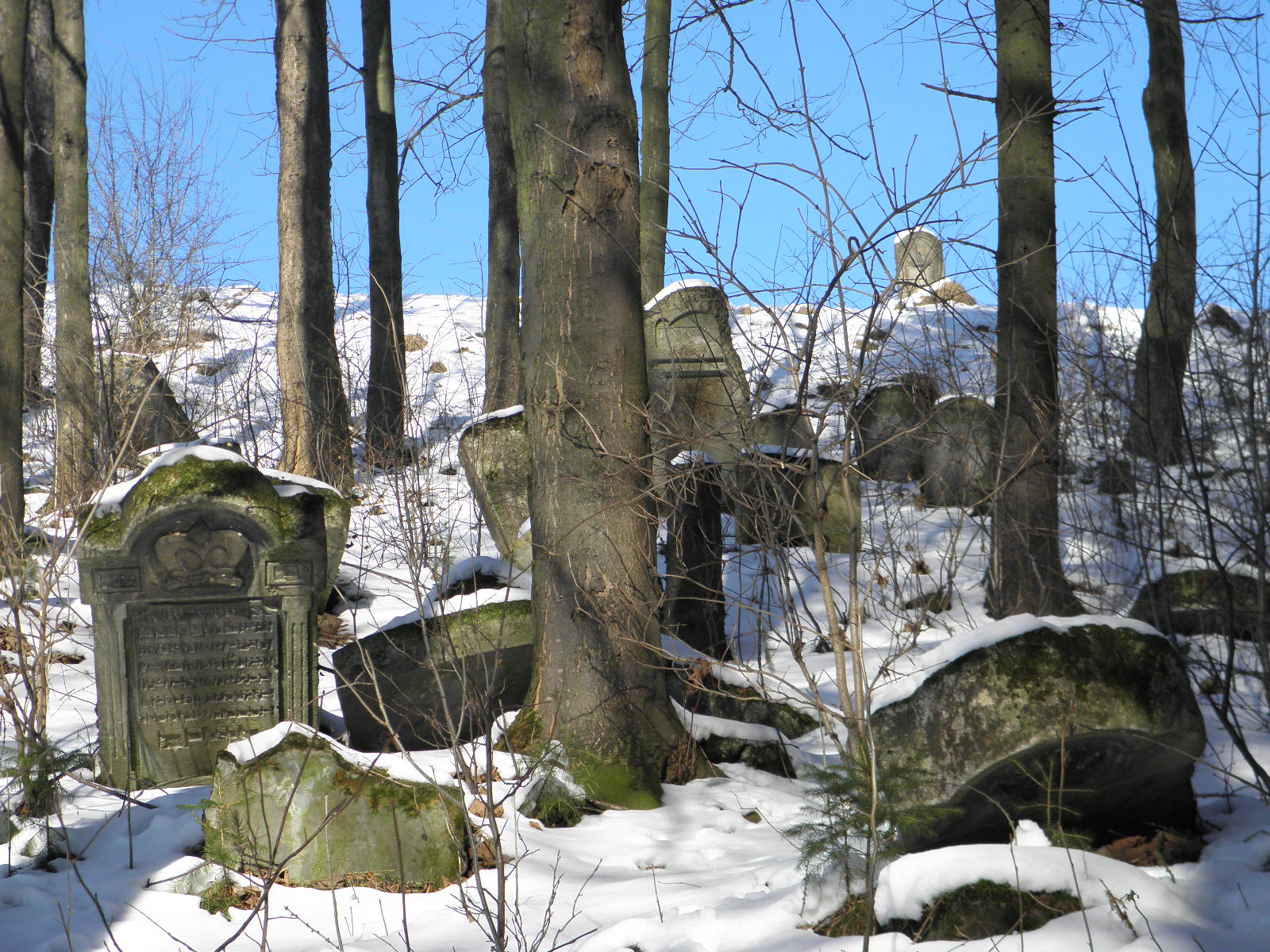 Турка, окопище, 30 січня 2011 року: Зимова панорама окопища